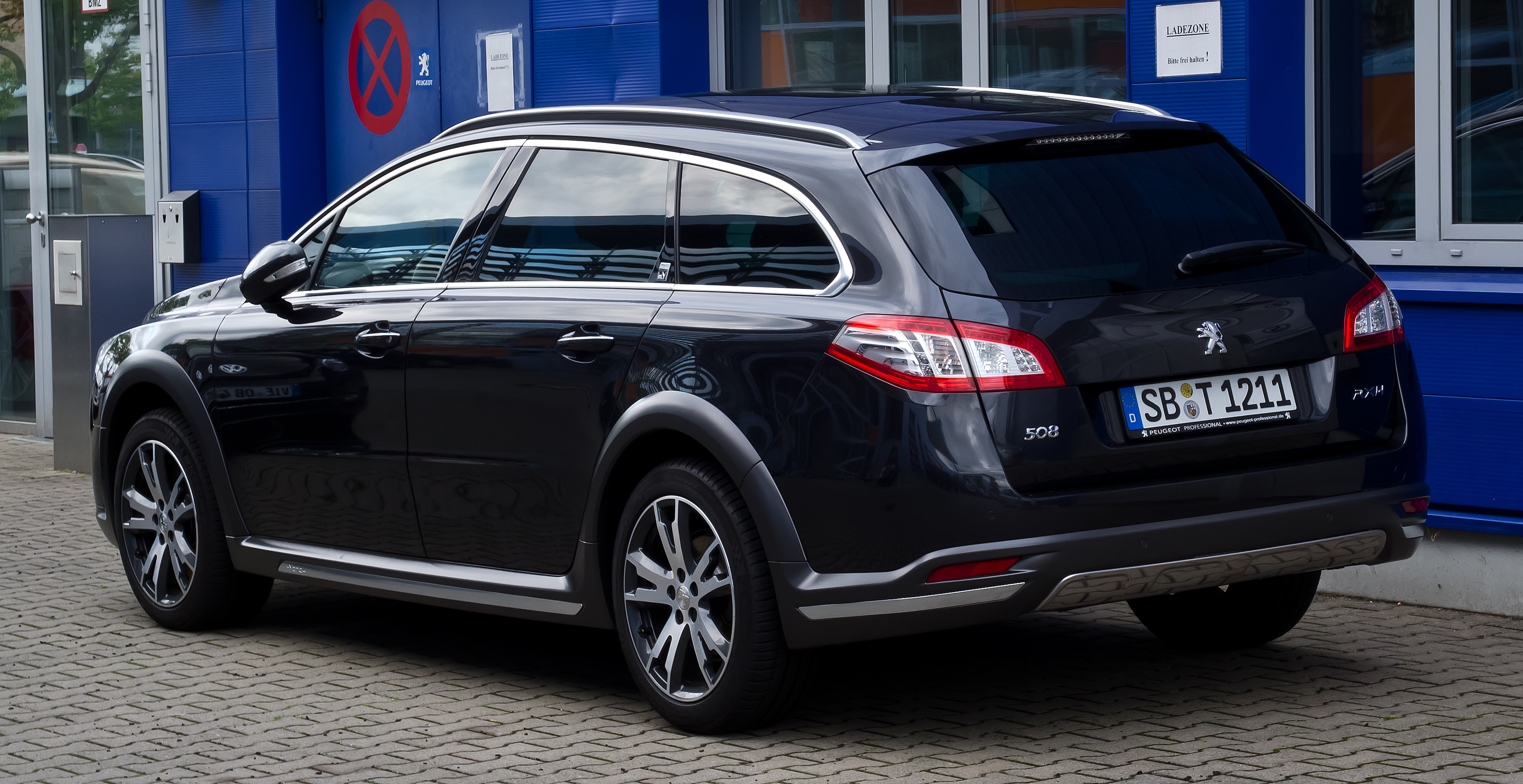 Peugeot 508 RXH HYbrid4